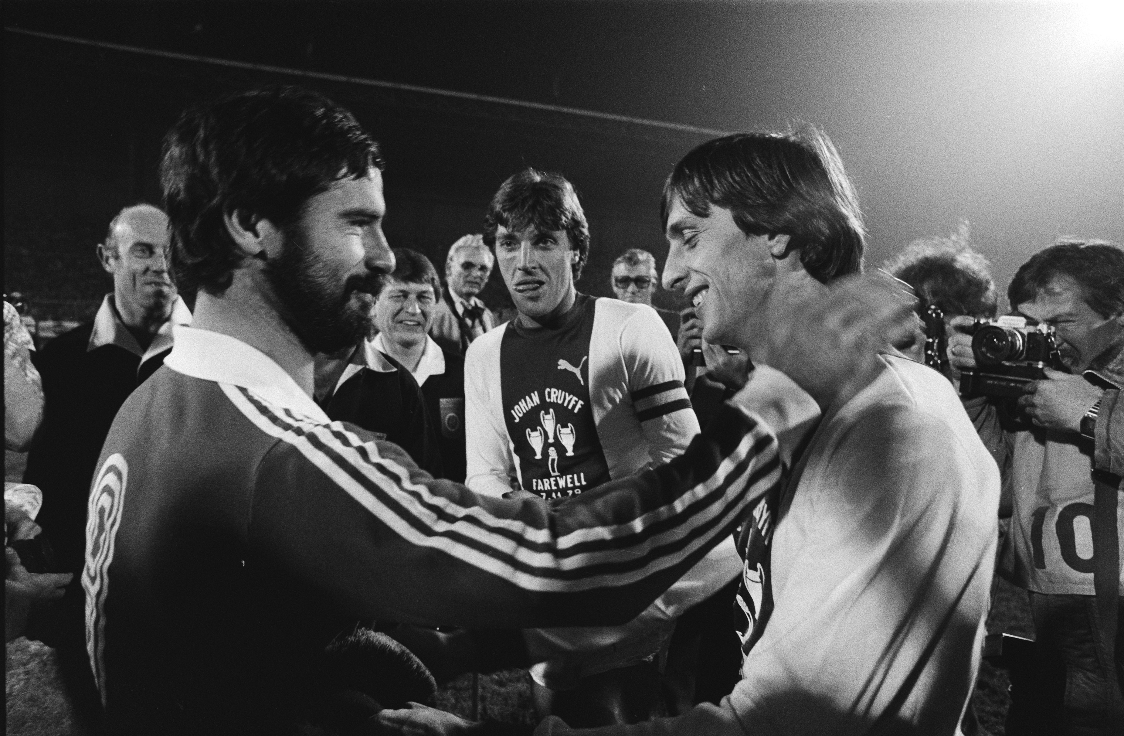 Collectie / Archief : Fotocollectie Anefo Reportage / Serie : [ onbekend ] Beschrijving : Afscheidswedstrijd Johan Cruijff , Ajax tegen Bayern Munchen 0-8; Cruijff met Gerd Muller (l) Datum : 7 november 1978 Trefwoorden : afscheid, sport, voetbal Persoonsnaam : Bayern Munchen, Cruijff, Johan, Gerd Muller Fotograaf : Suyk, Koen / Anefo Auteursrechthebbende : Nationaal Archief Materiaalsoort : Negatief (zwart/wit) Nummer archiefinventaris : bekijk toegang 2.24.01.05 Bestanddeelnummer : 929-9830